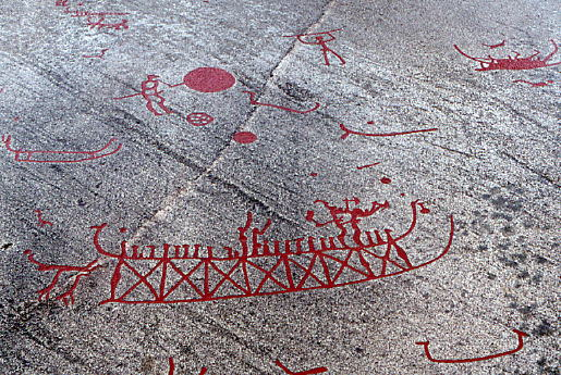 Gravure préhistorique de Tanum, Suède